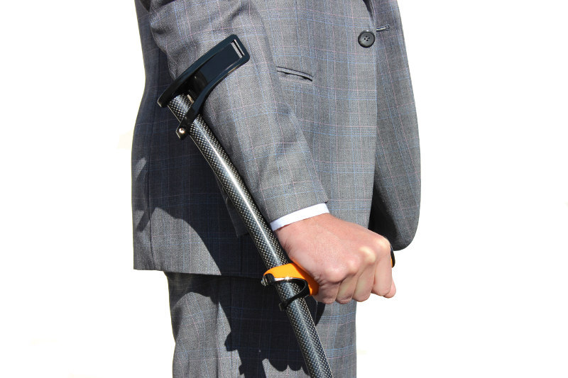 stampella canadese fabbricata in carbonio secondo brevetto WIPO WO2012072833 A1